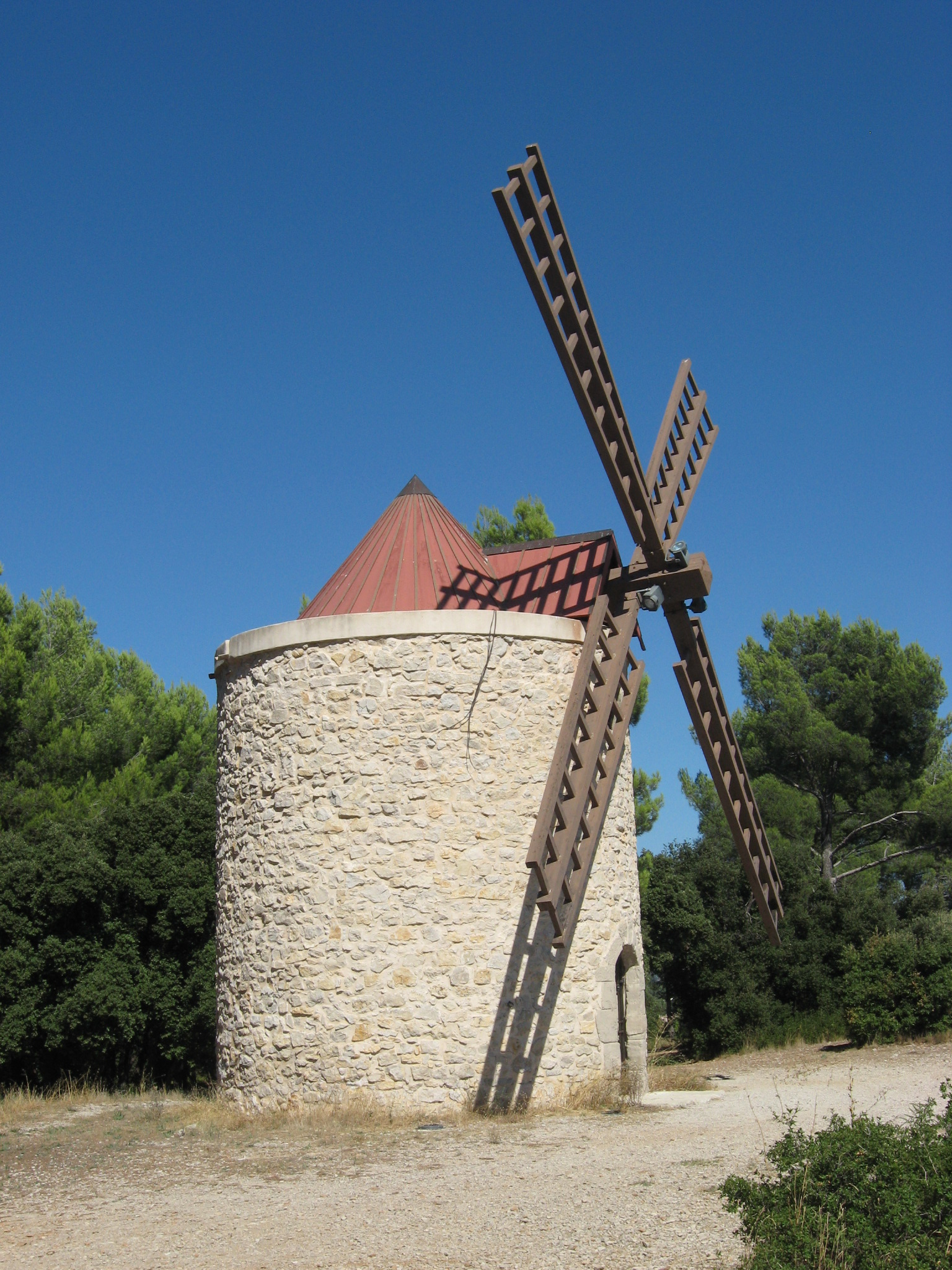 Moulin du Rousset (Bouches-du-Rhône), France